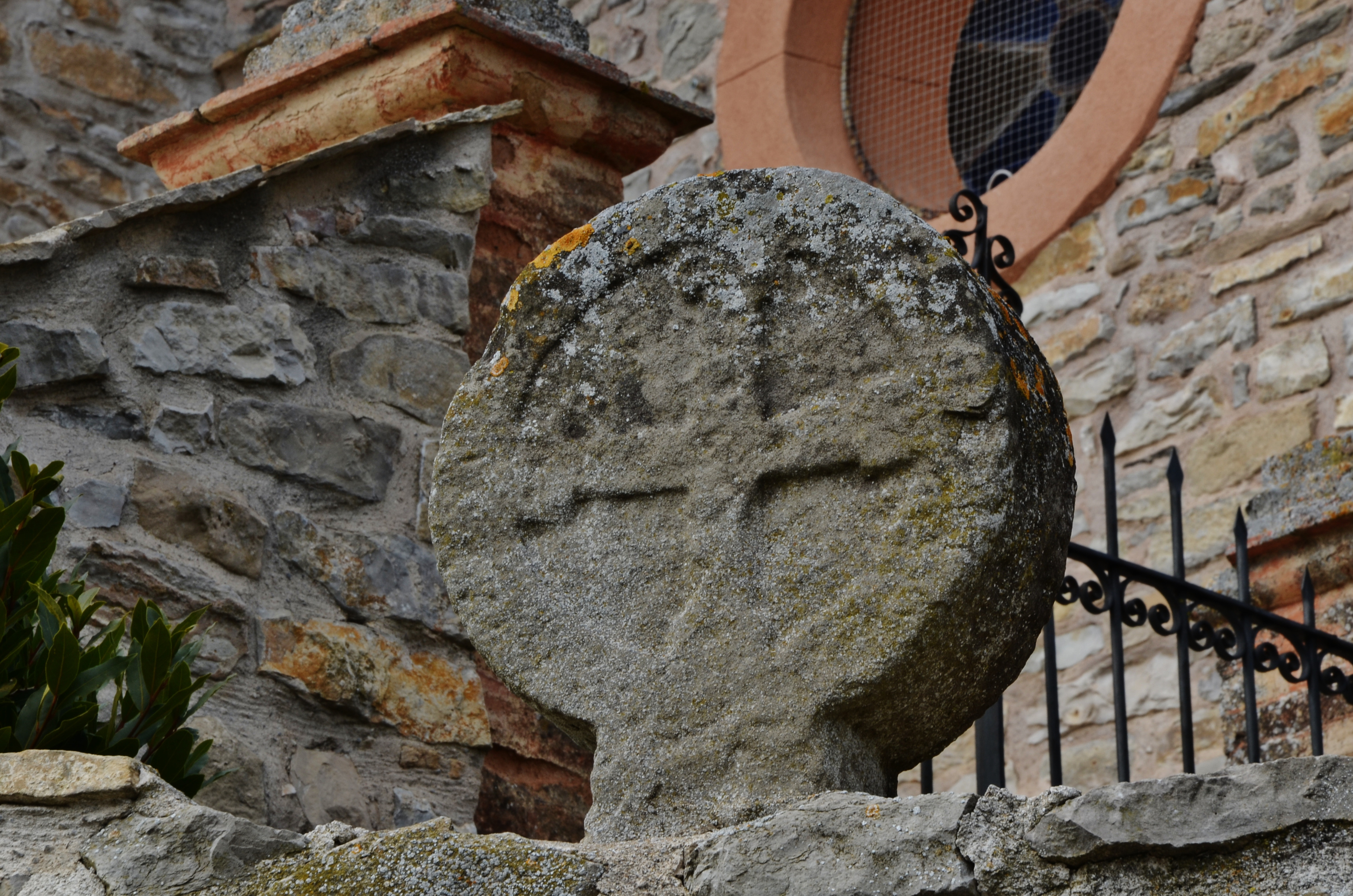 Església de la Santa Fe de Rauric (Llorac)